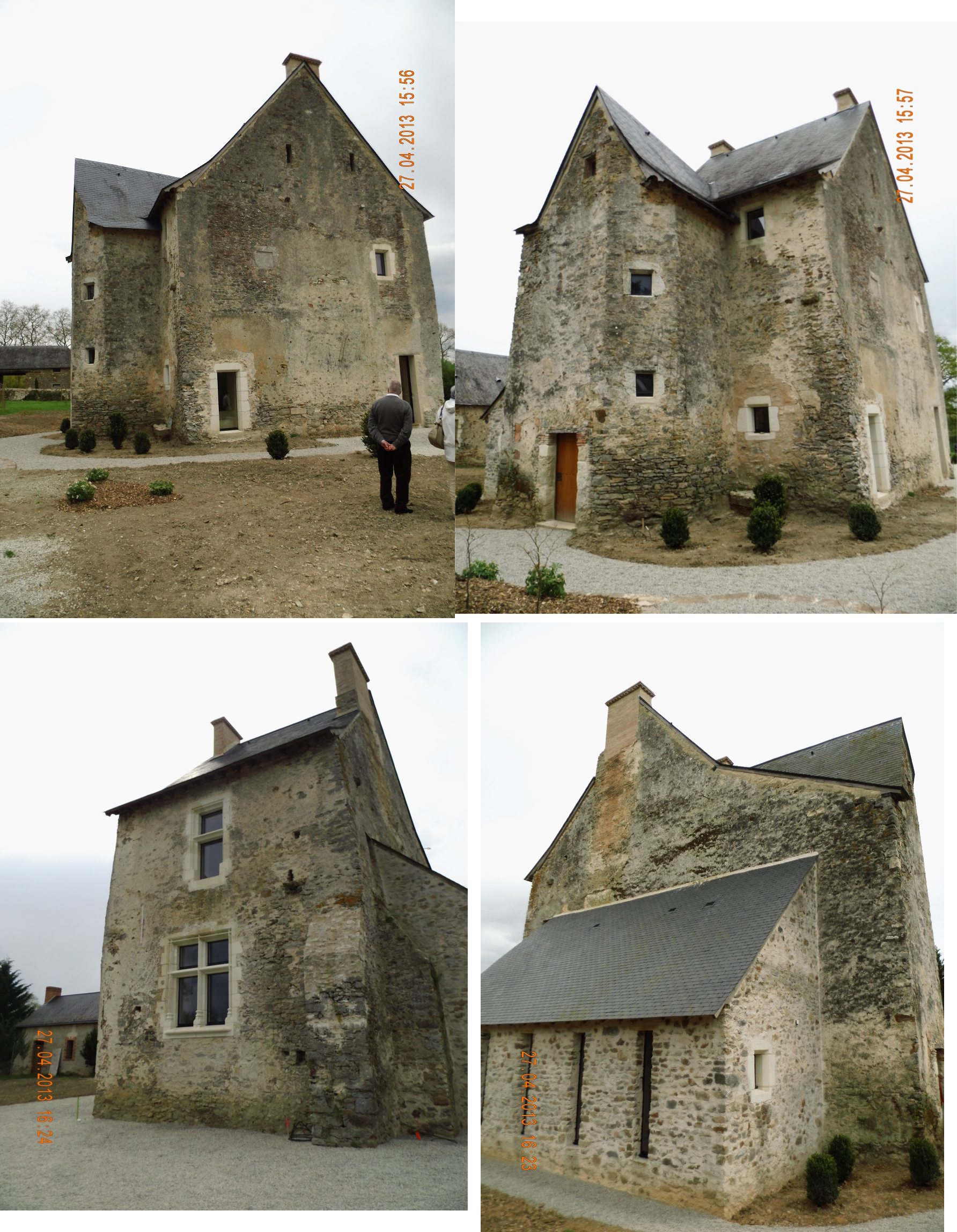 Reste de l'ancienne infirmerie de l'abbaye de Bellebranche, appelée également Tour saint Michel.